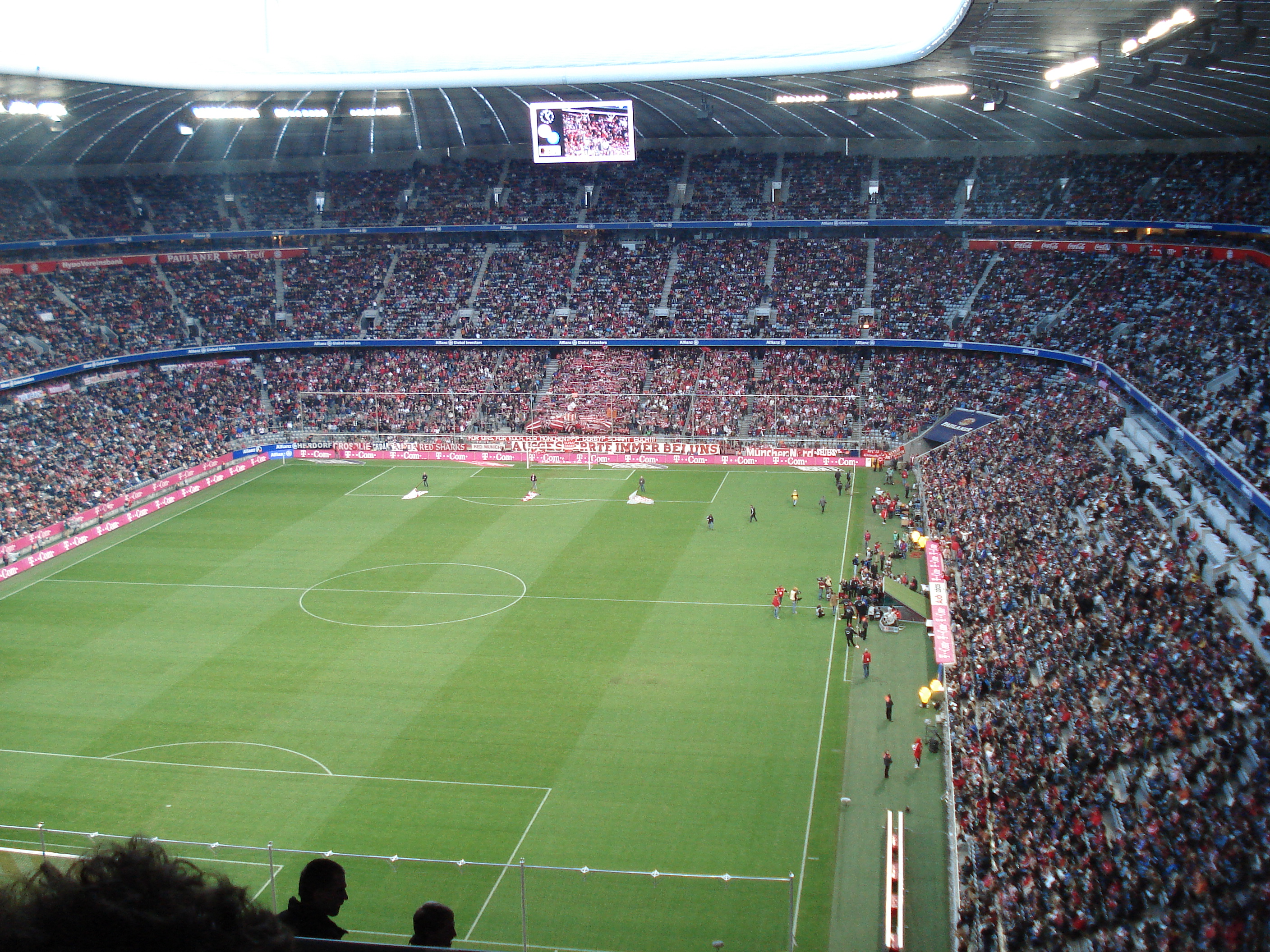 Kurz vor dem Anpfiff